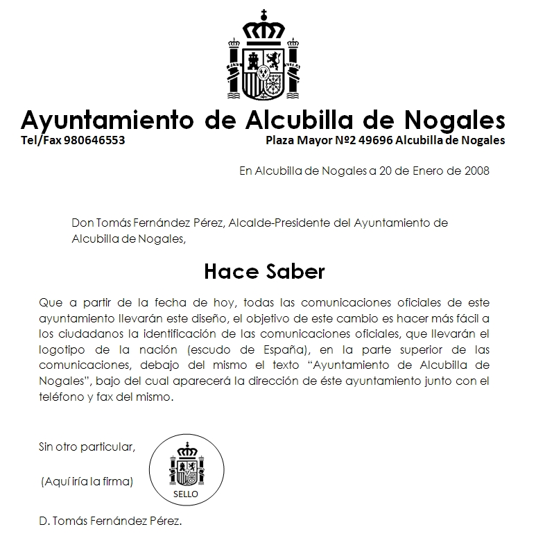 Ejemplo de bando del Ayuntamiento de Alcubilla de Nogales (Zamora)